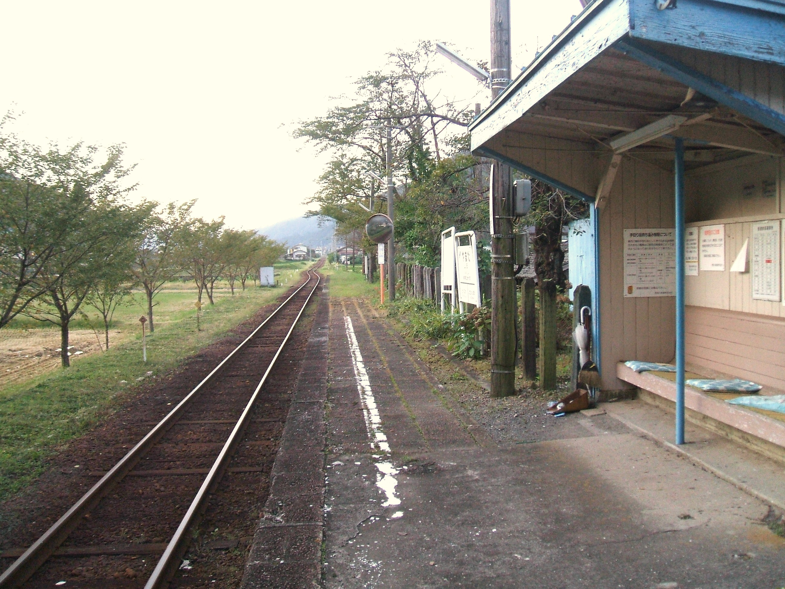 ホームの様子